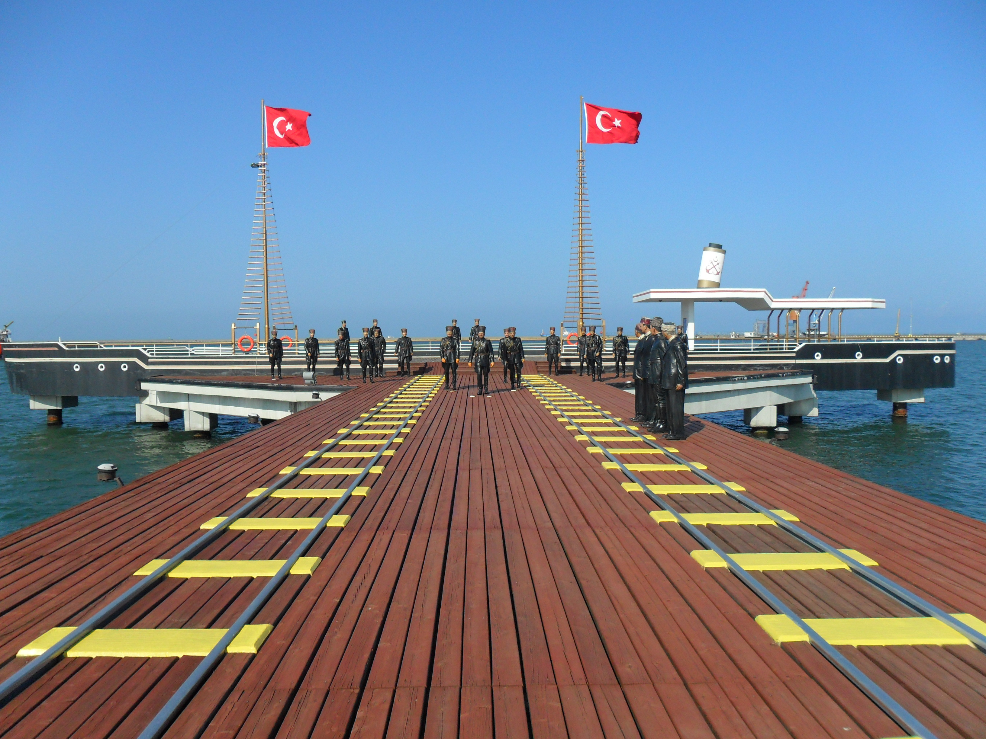 Mustafa Kemal'in Samsun'a çıktığı Tütün İskelesi'nin yenilendikten sonraki görünümü.